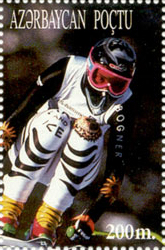 Katja Seizinger (1972), alpine skier from Germany